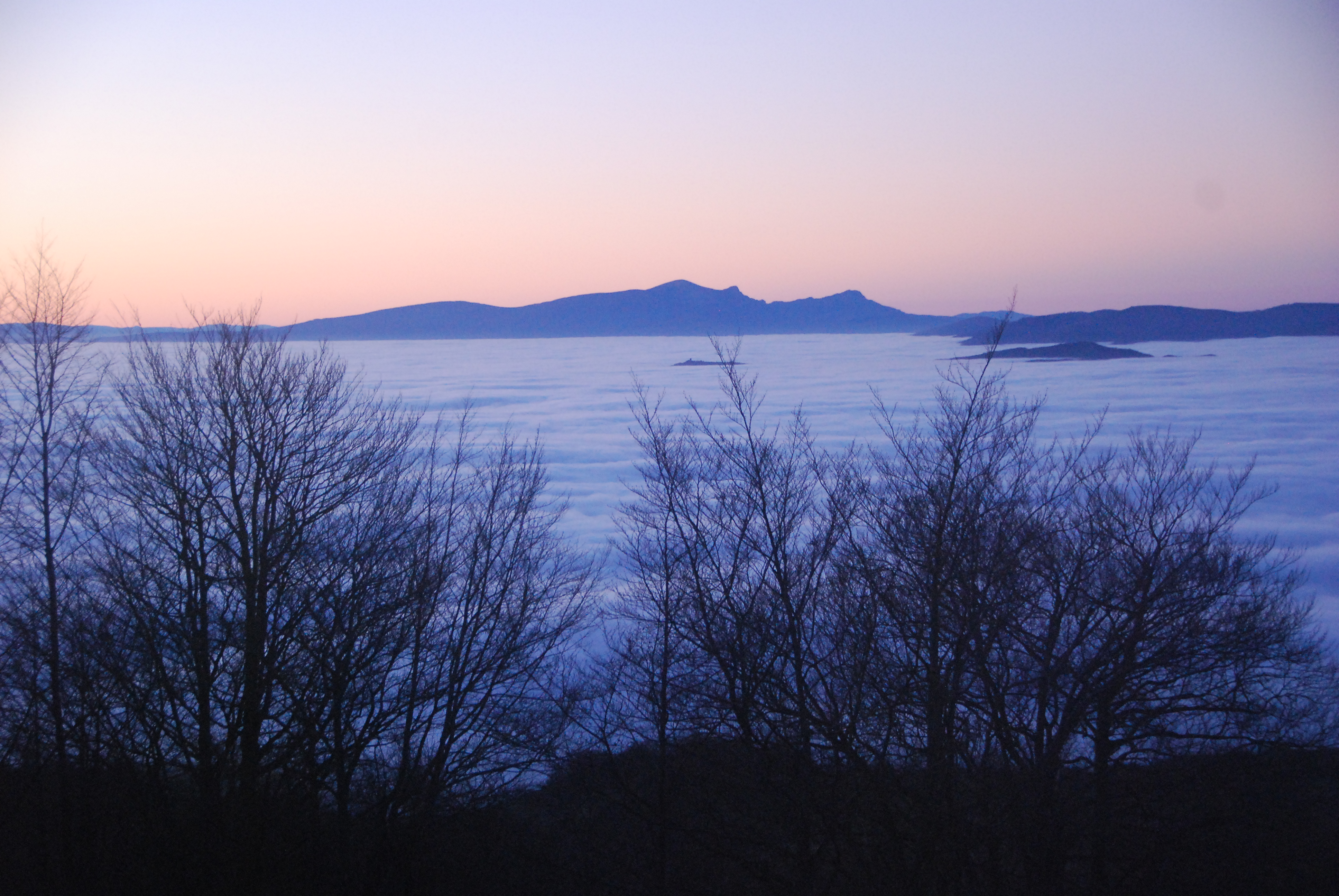 Legaireko parke megalitikoa. Arabako lautadaren ikuspegia lainopean Opakua mandatetik. Bukaeran Gorbeia mendia